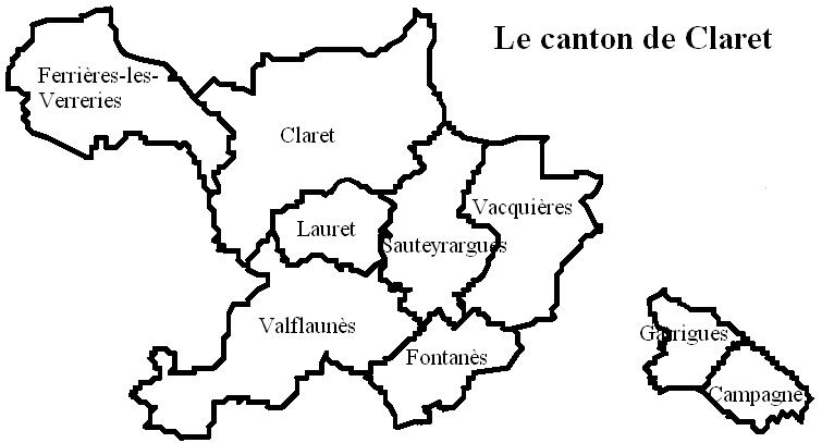 Le canton de Claret Image personnelle